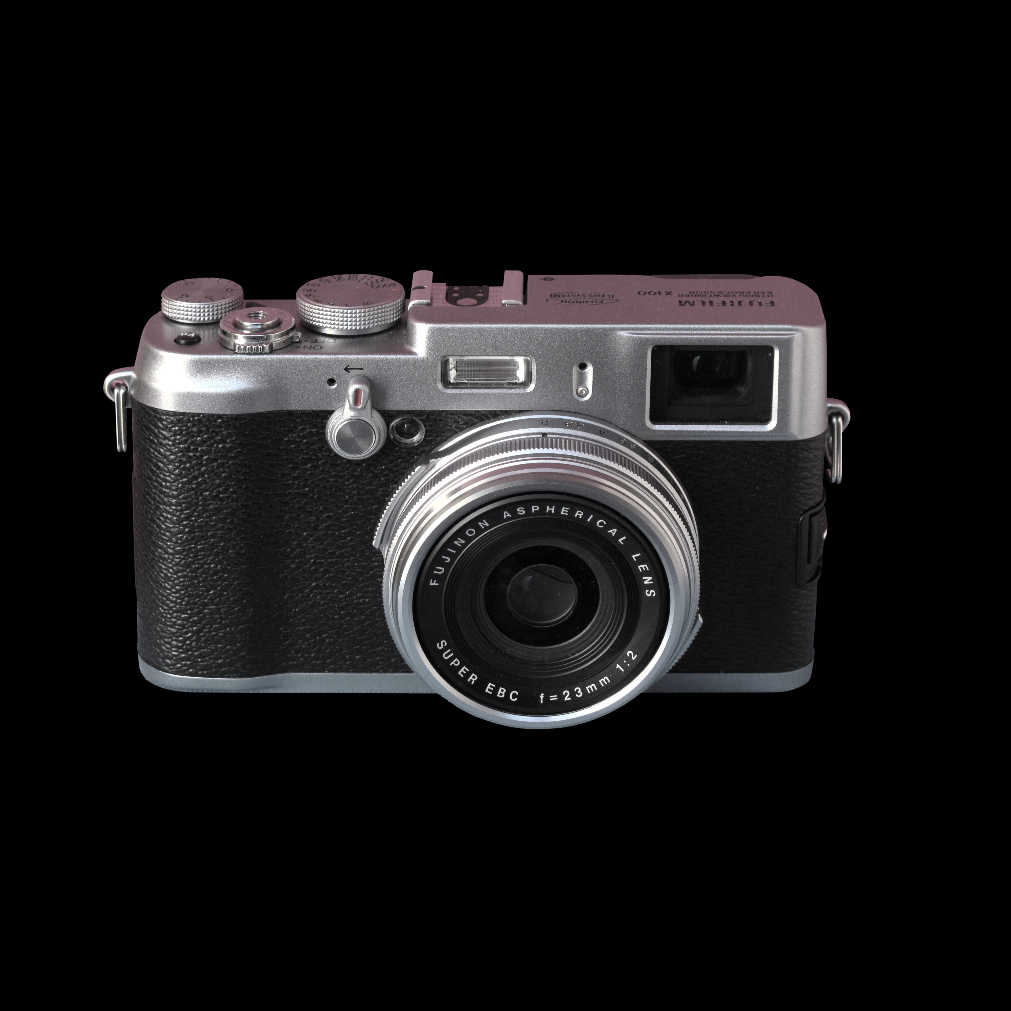 Fujifilm FinePix X100